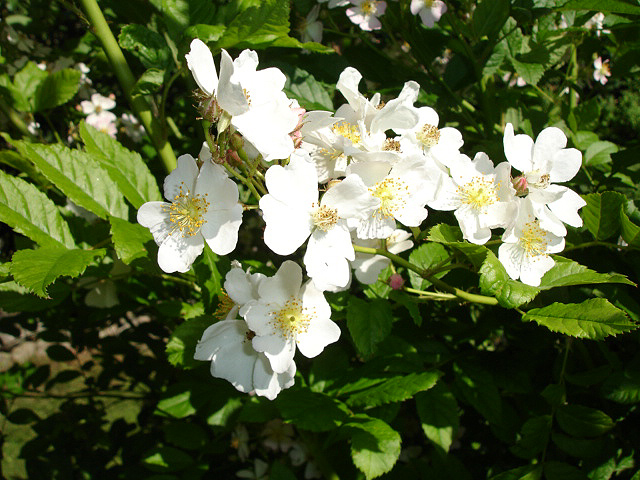 Rosa multiflora var. multiflora